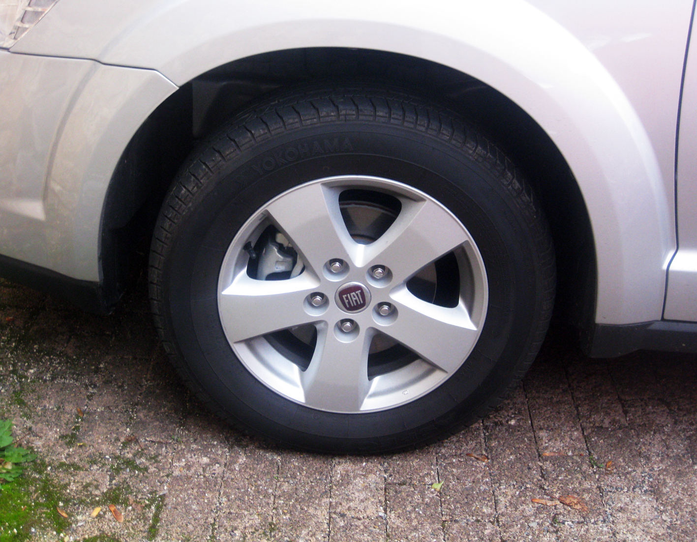 Felge eines Fiat Freemont